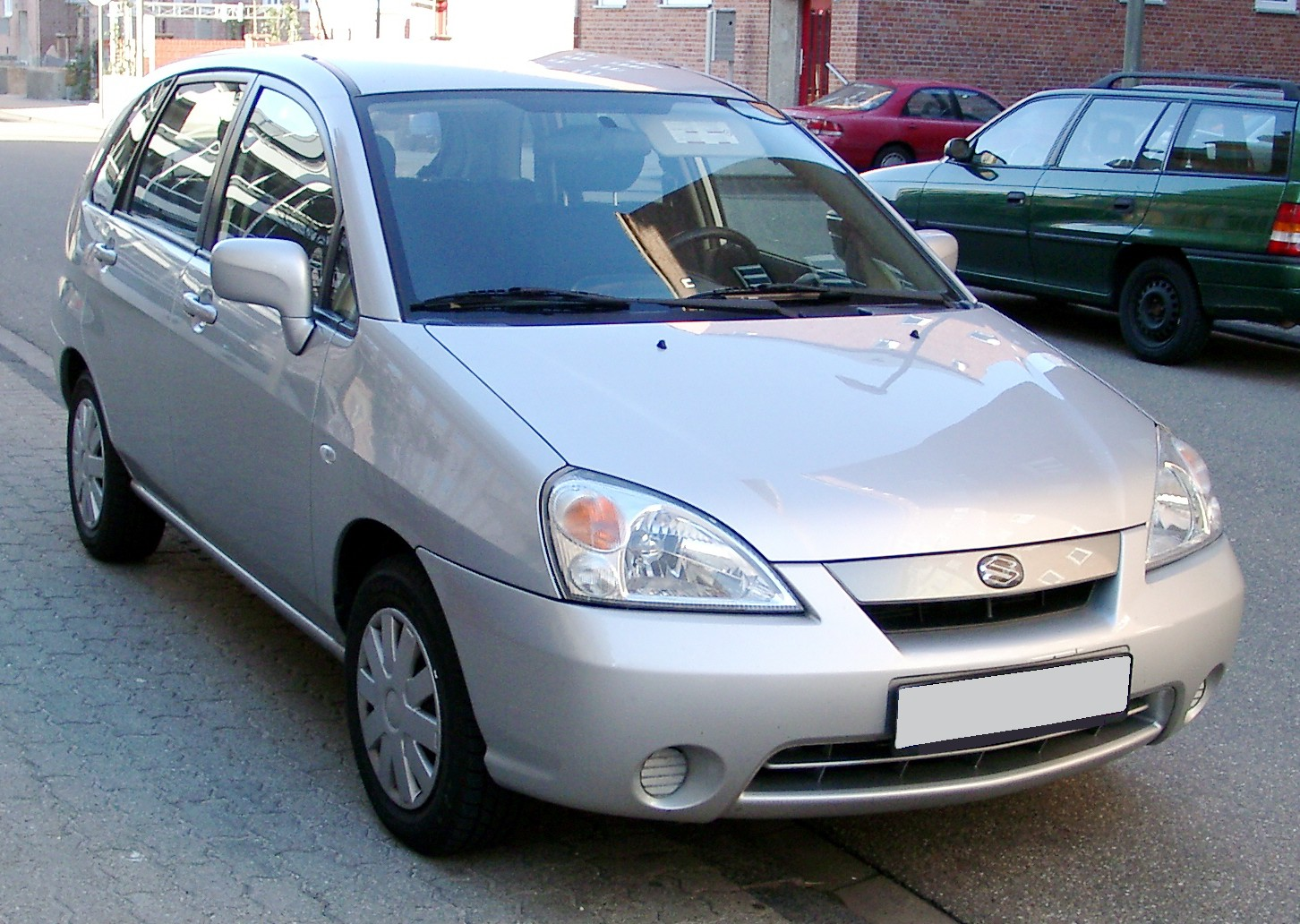 Suzuki Liana, die deutsche Version des Suzuki Aerio